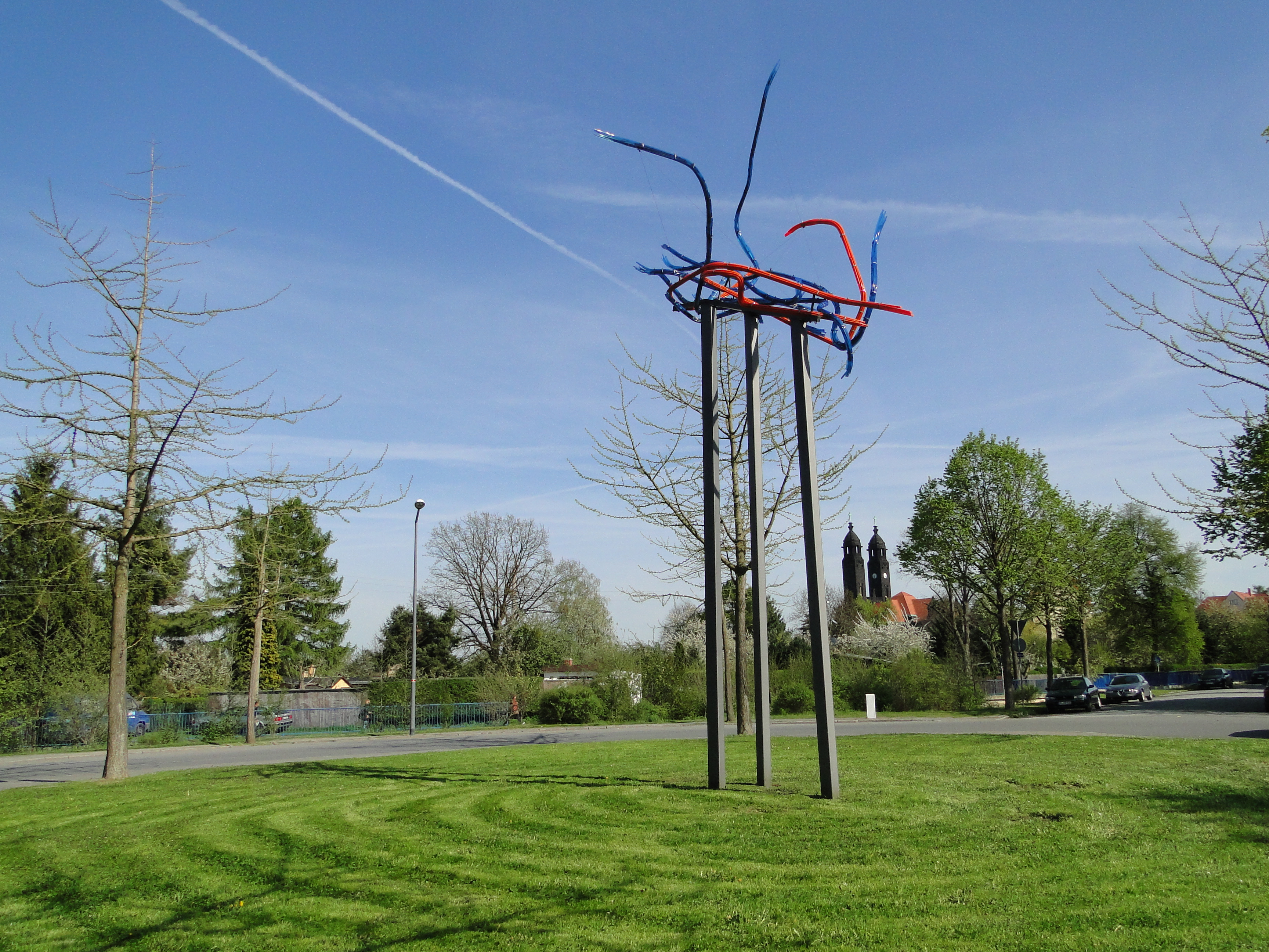 Skulptur "Innere Mitte" von Kerstin Franke-Gneuß in Dresden